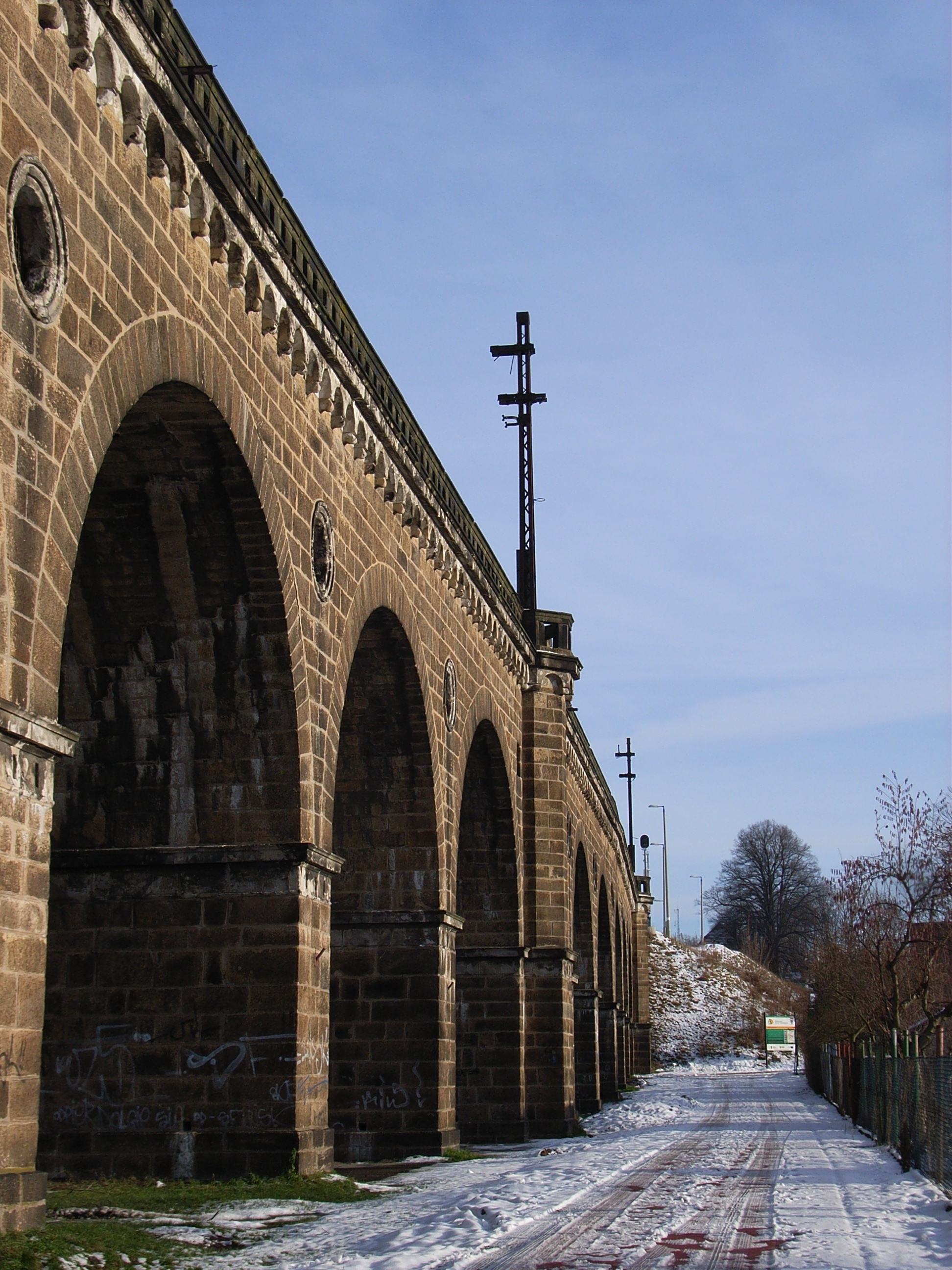 Das Neißeviadukt auf heute polnischer Seite der Neiße (originaler Zustand der Erbauung), Blick Richtung Bahnhof Zgorzelec (bis 1945: Bahnhof Görlitz-Moys)